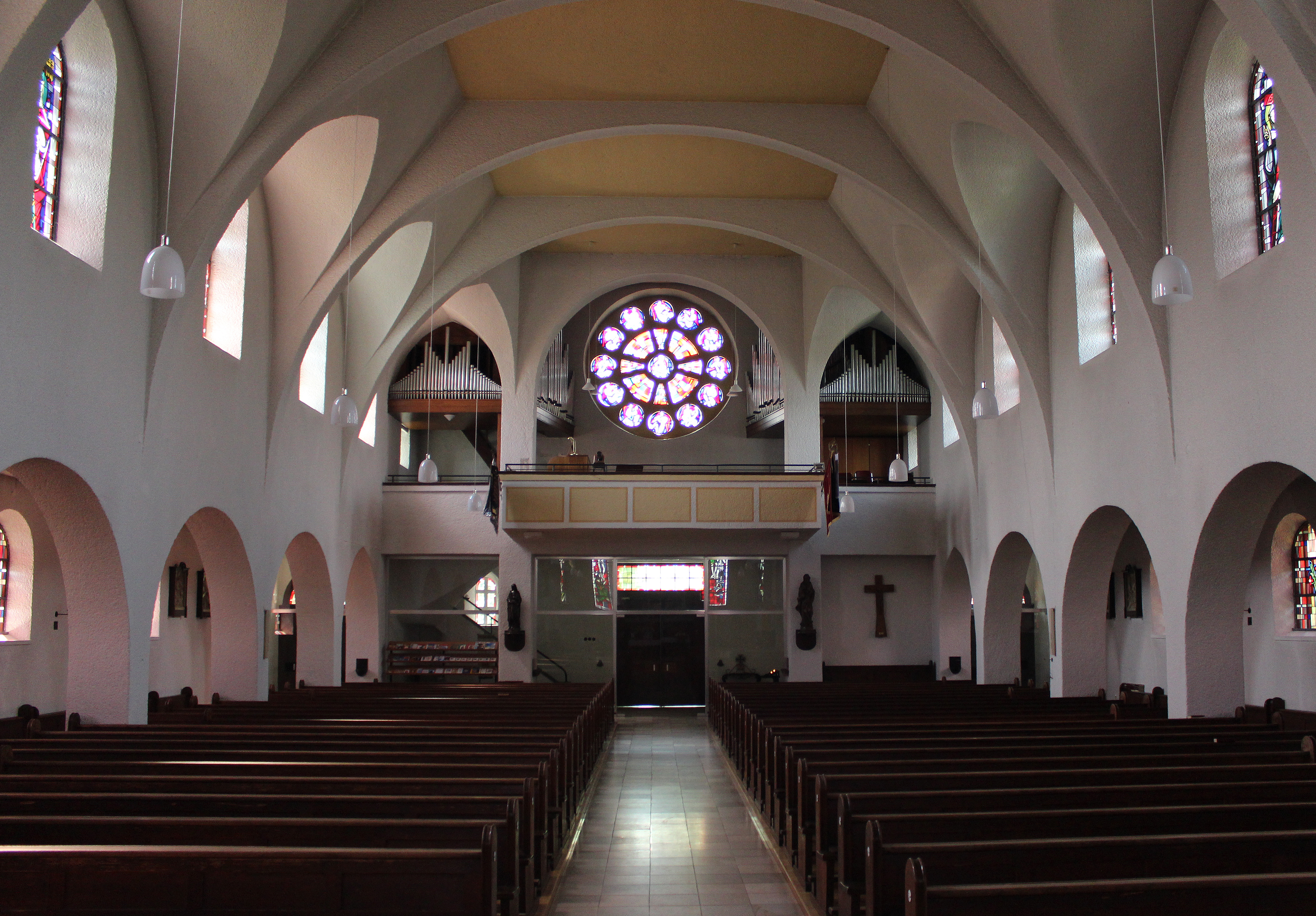 Blick ins Innere der katholischen Pfarrkirche St. Matthias in Altforweiler, einem Ortsteil der Gemeinde Überherrn, Landkreis Saarlouis, Saarland